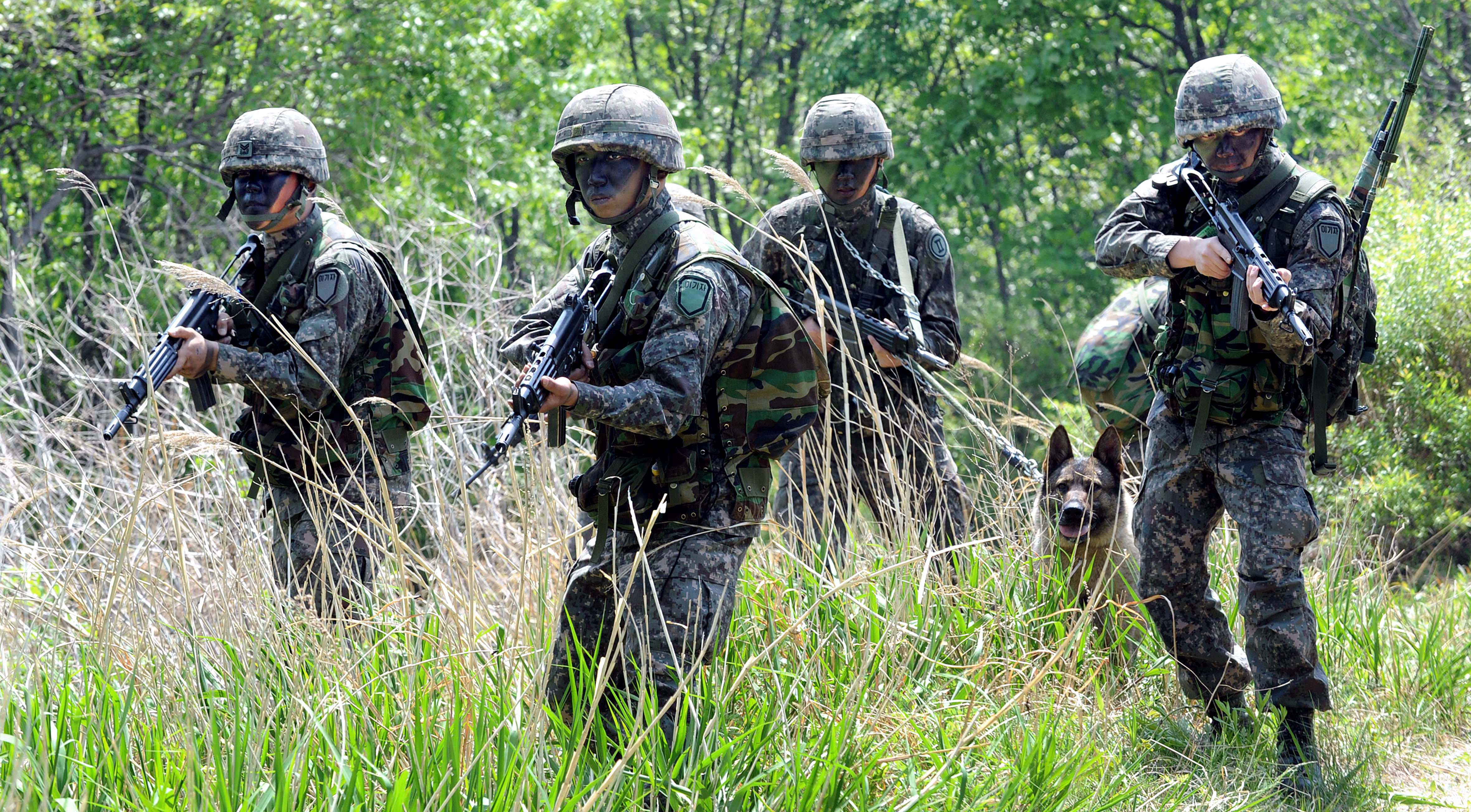 13일 육군 27보병사단 수색대대 장병들이 강원도 화천군 작전지역 일대에서 지상협동훈련의 일환으로 탐색격멸작전을 펼치고 있다. 촬영 - 김태형 기자